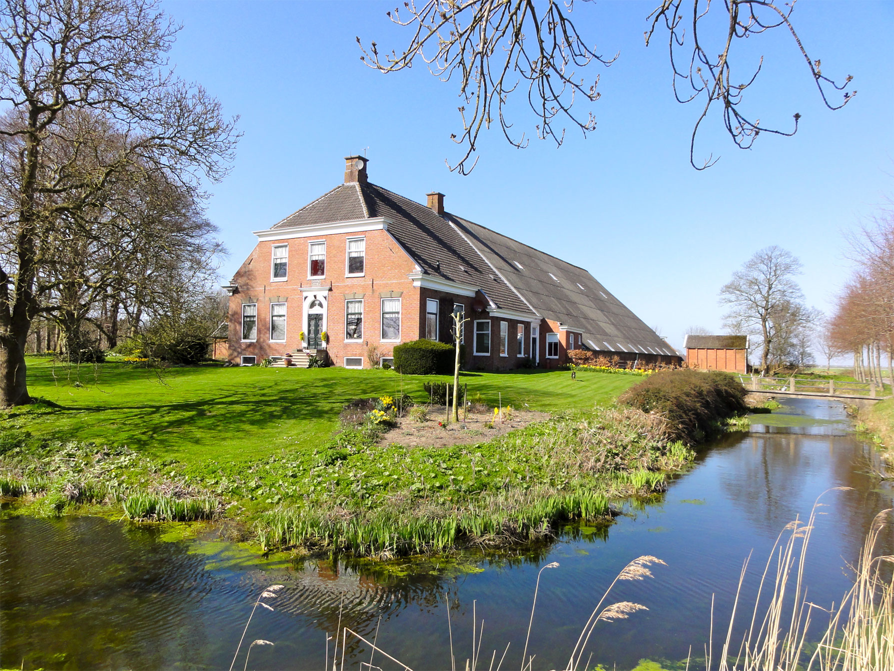 Boerderij Ottoma in Uithuizen